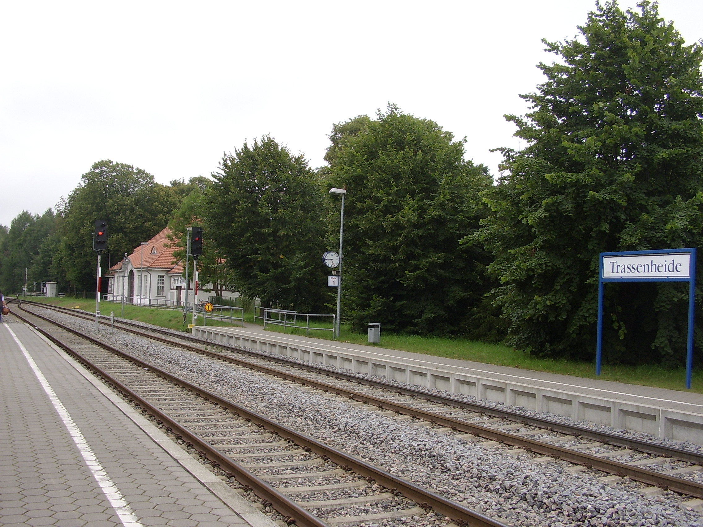 Вокал Трассенхайде